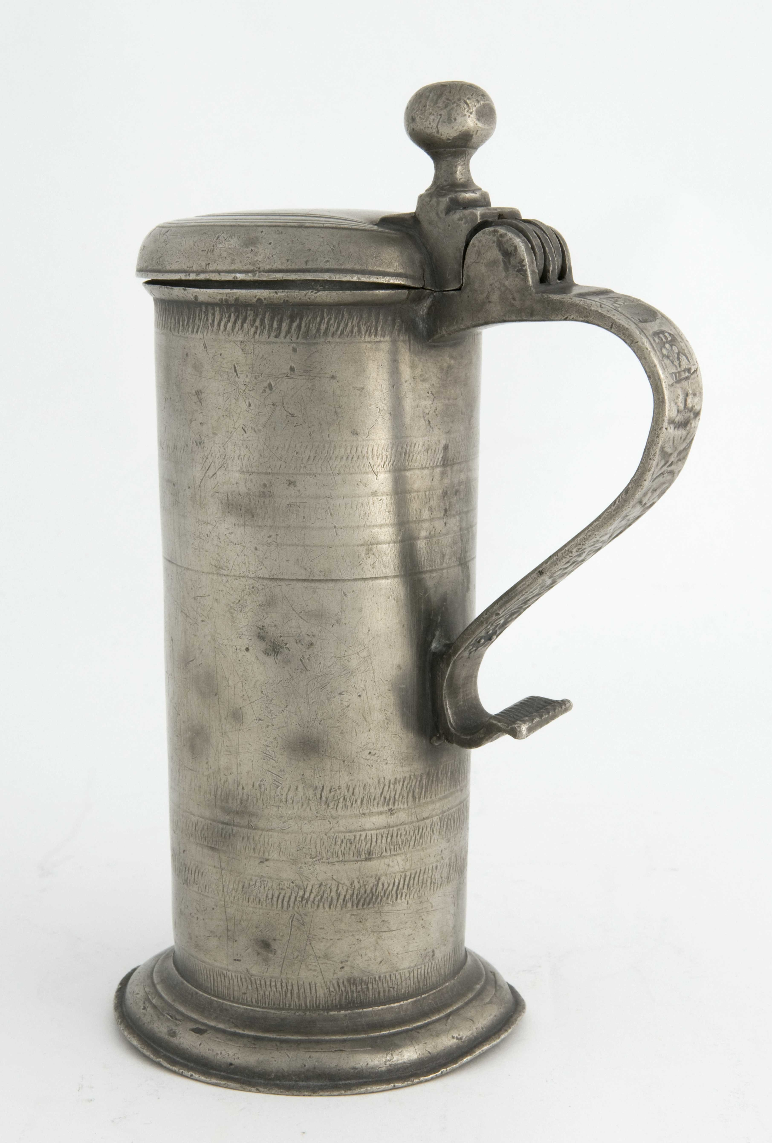 Drikkekanne av tinn. Stemplet 1736. Podusert av Marcus Pedersen Brandt i Bergen. H. 23 cm. Norsk Folkemuseum, NF.1896-0039.